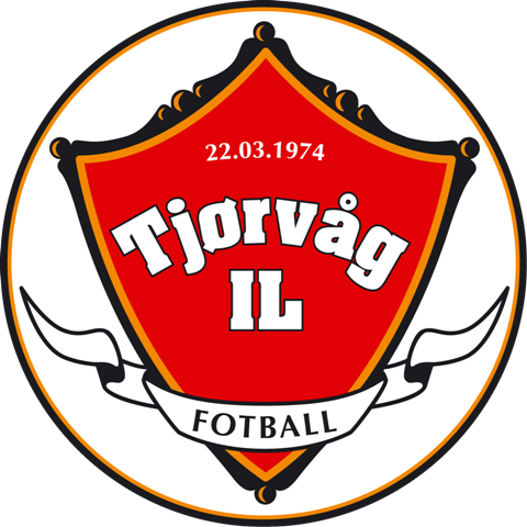 logo til Tjørvåg IL